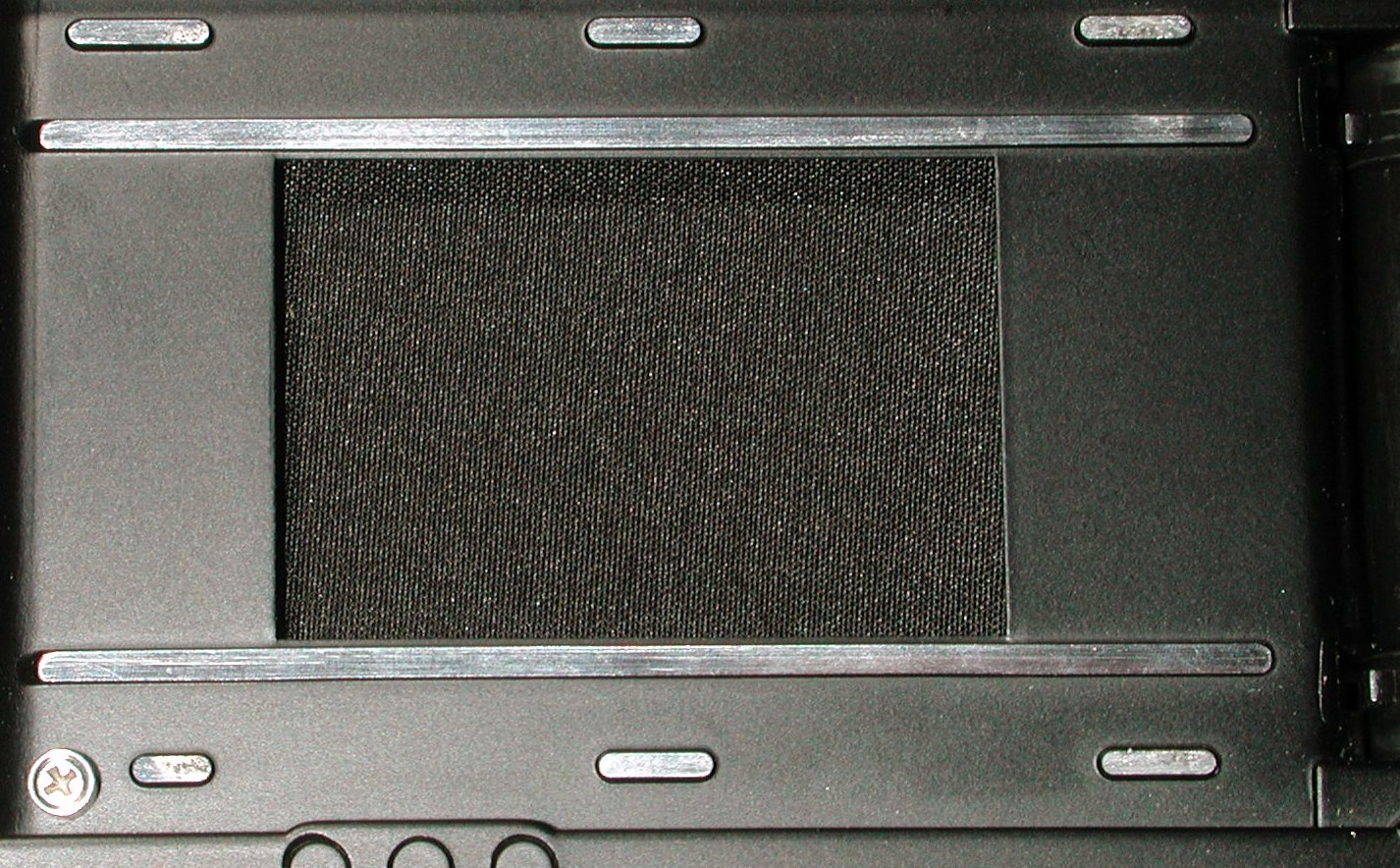 Rideau d'obturateur d'un 24x36 mm Auteur , photographie personnelle. 7 novembre 2006